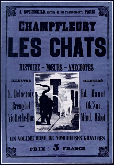 Affiche promotionnelle pour le lancement de l'album Les Chats" de Jules Champfleury, publié en 1868 chez Jules Rothschild.